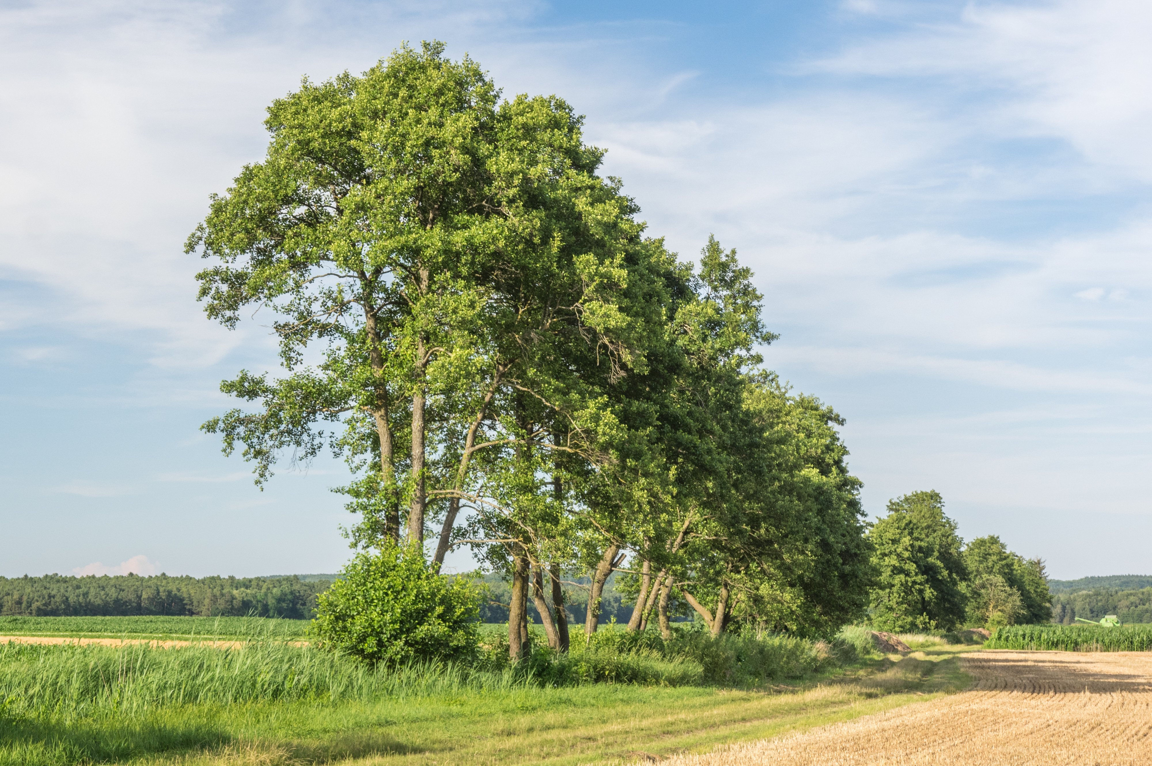 Teilbereich des Riedgrabens mit Gehölzbestand, von Westen, Naturdenkmal ND-06626